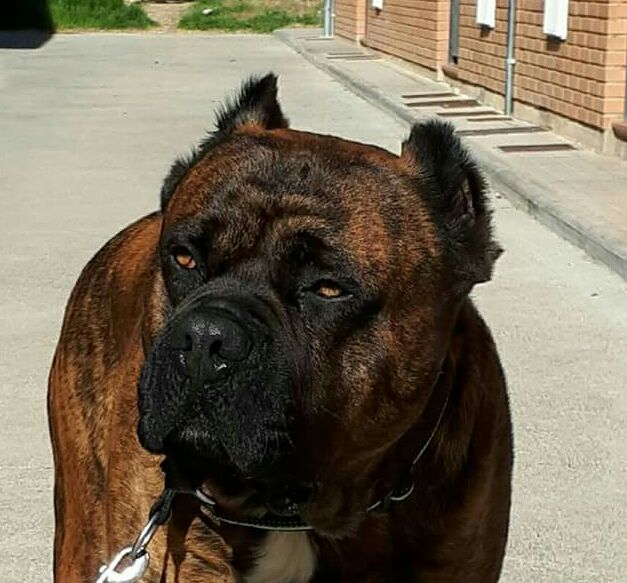 Dogo Español atigrado